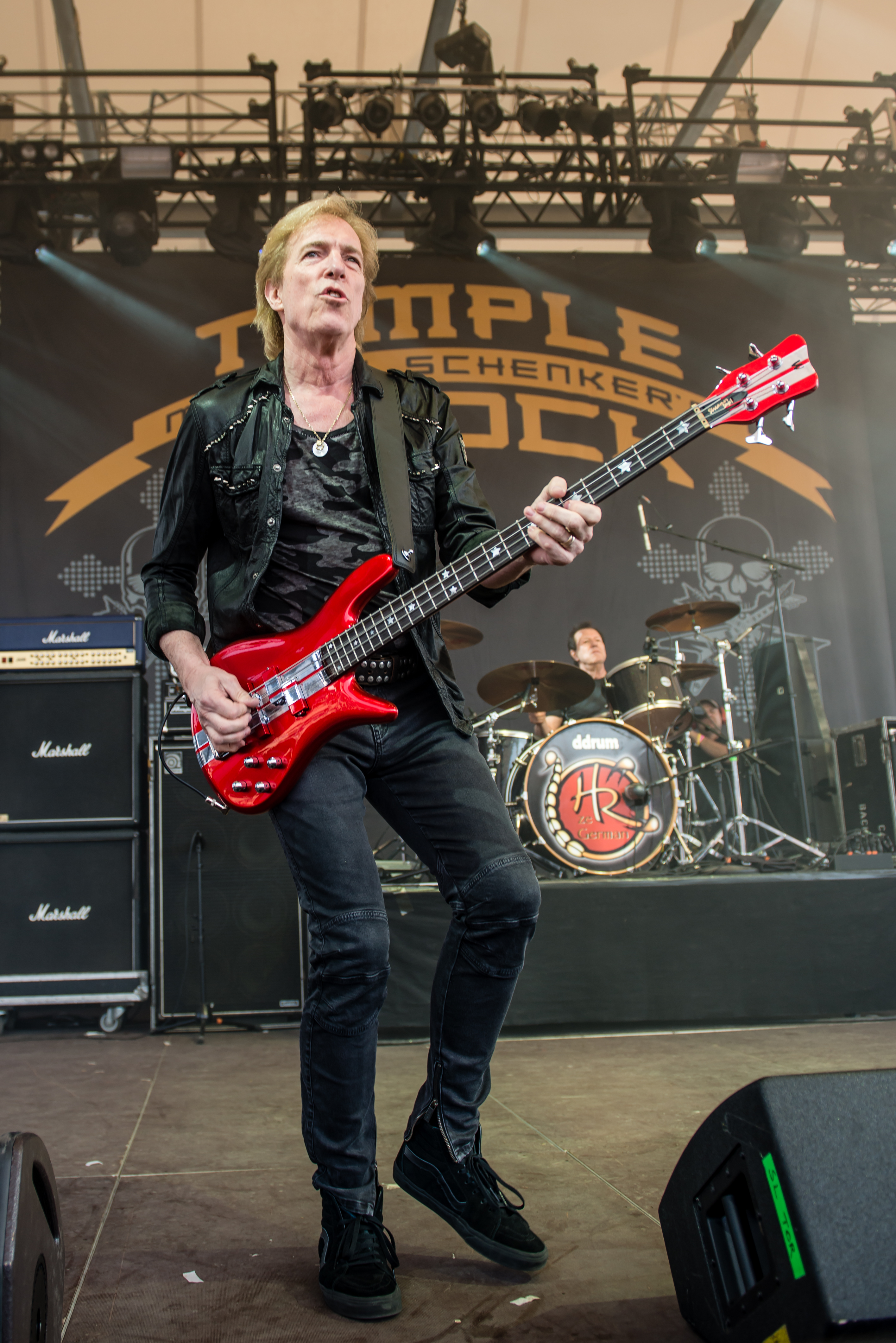 'Rock Hard Festival 2015; Gelsenkirchen Amphitheater': ' Michael Schenker's Temple of Rock'